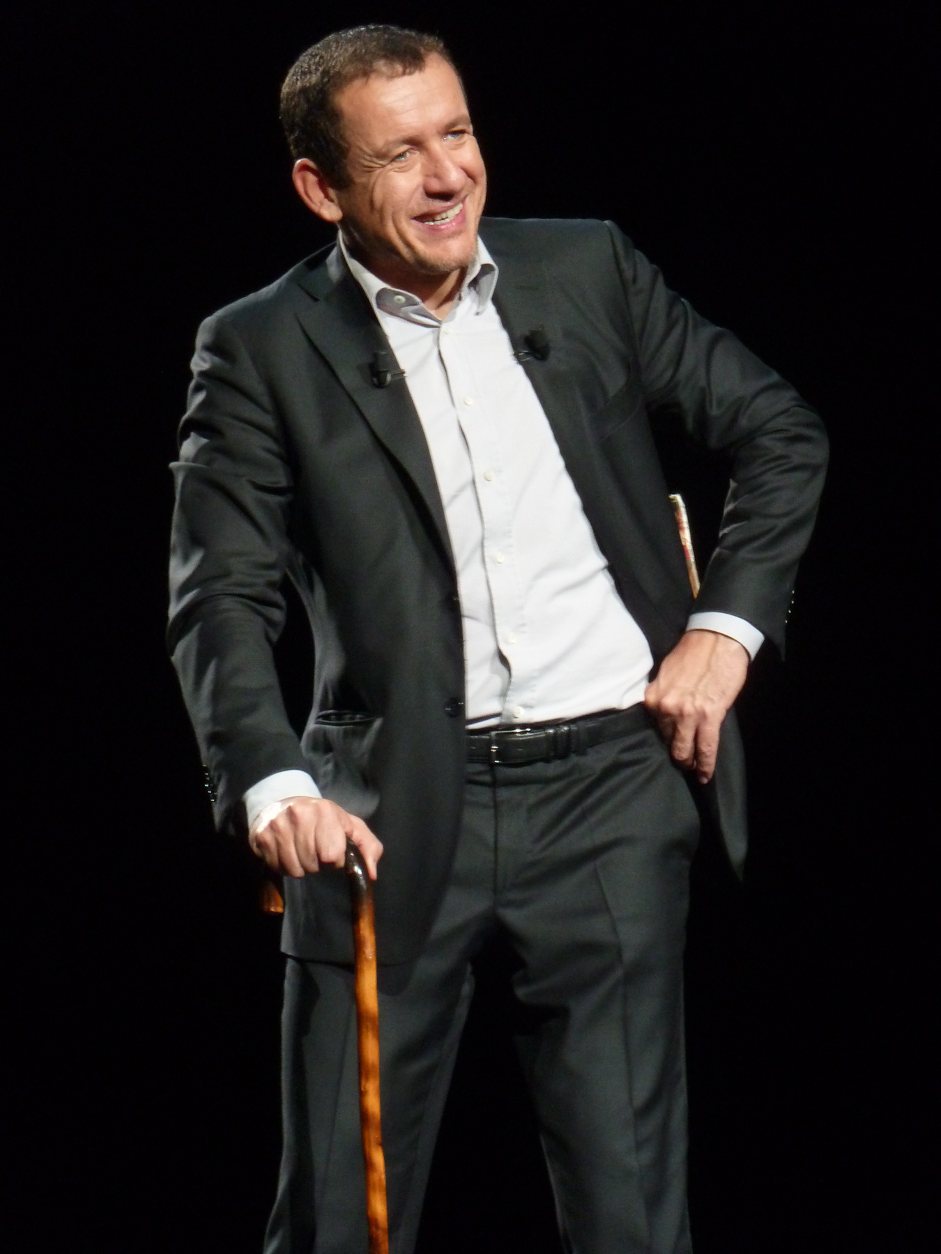 Dany Boon à l'Olympia (Paris, France), lors de son spectacle "Trop Stylé, samedi 10 décembre 2011